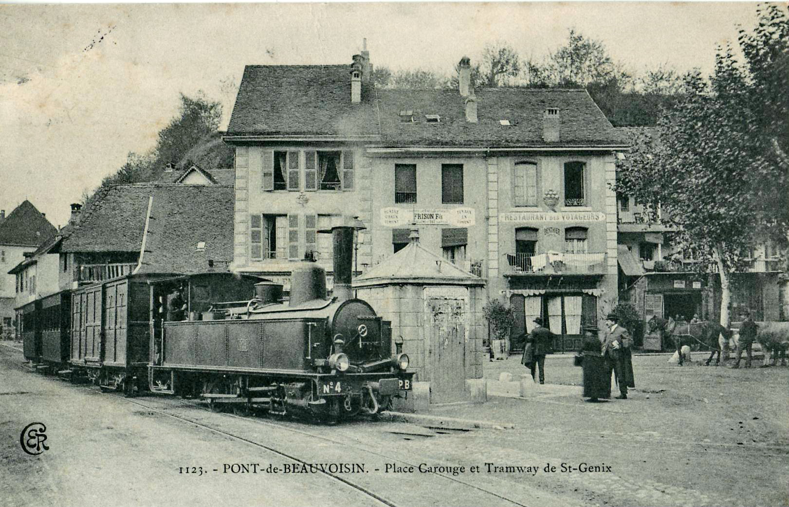 Carte postale ancienne éditée par ER, n°1123 :PONT-DE-BEAUVOISIN - Place Carouge et Tramway de Saint-Genix